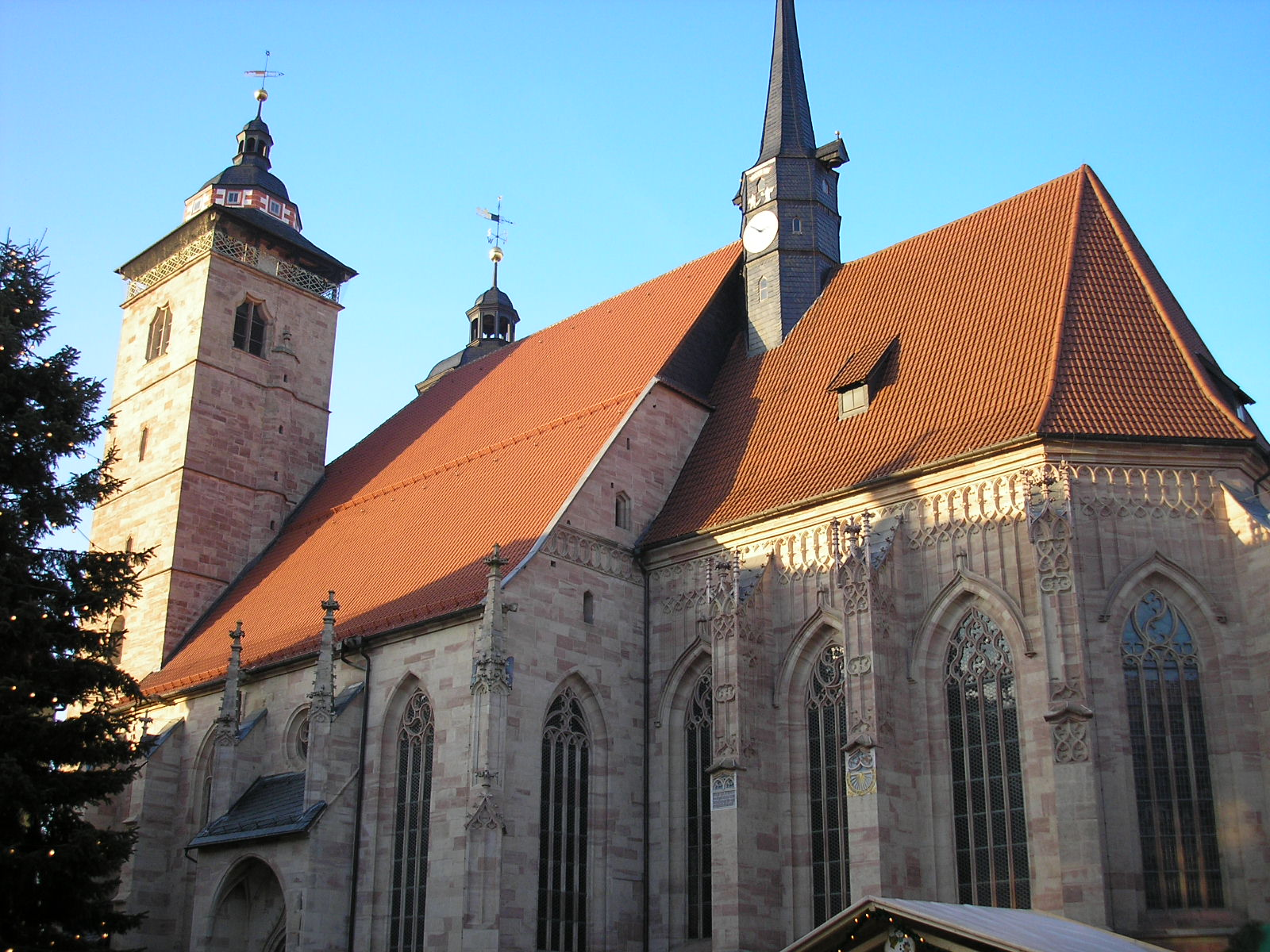 Die Stadtkirche von Schmalkalden (Thüringen).